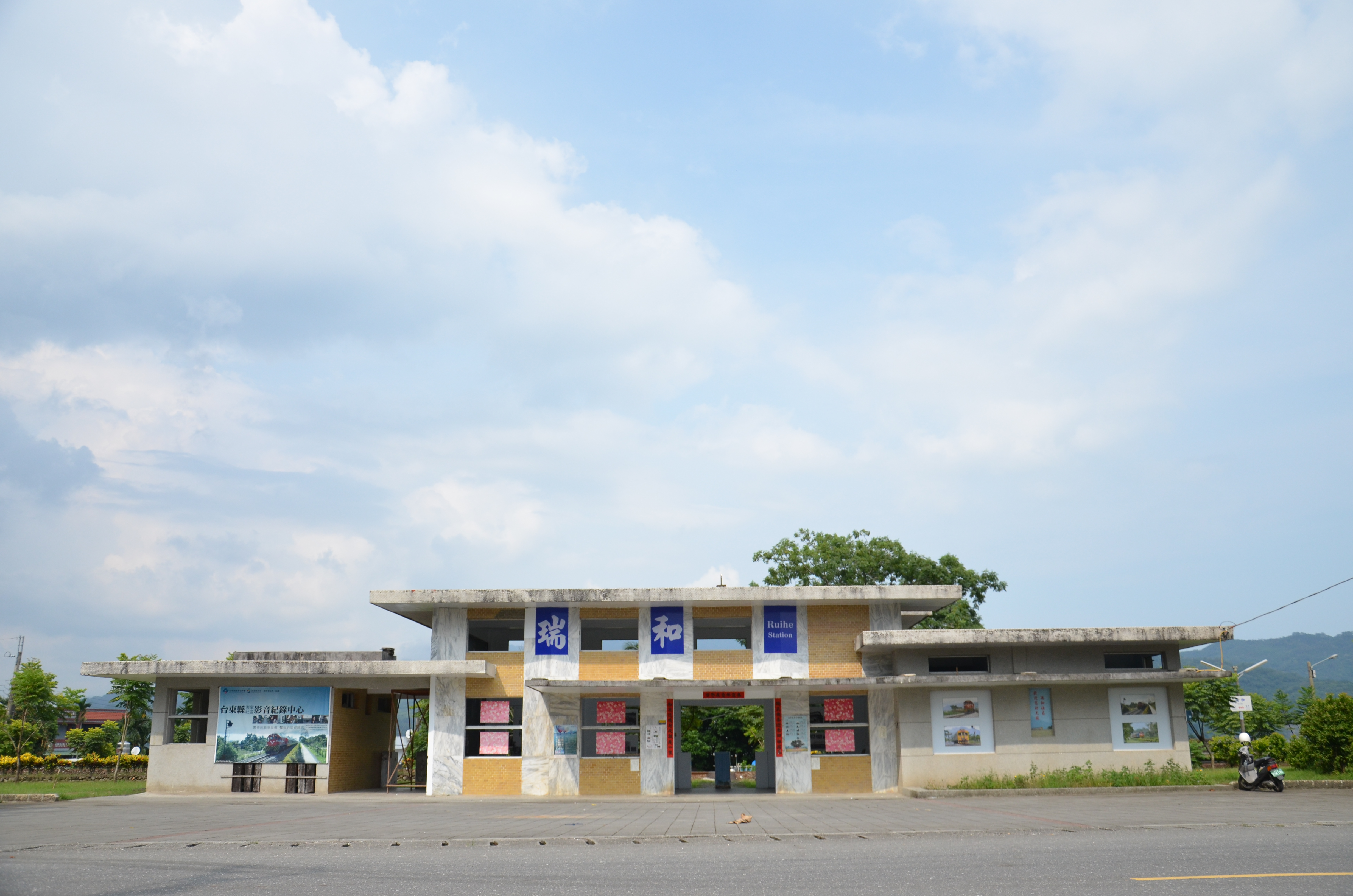 中文（台灣）: 瑞和車站站體。